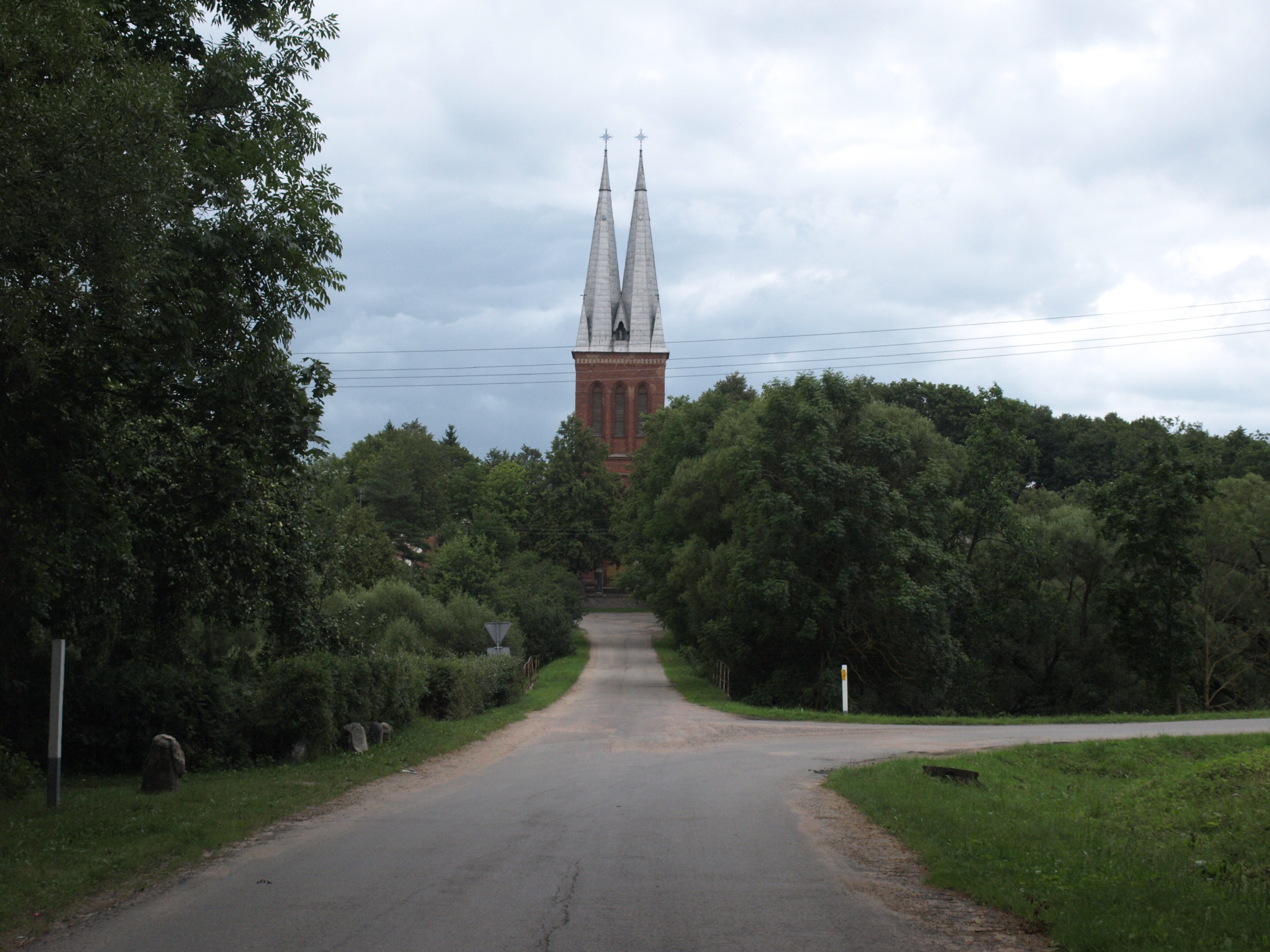 Panemunėlis church